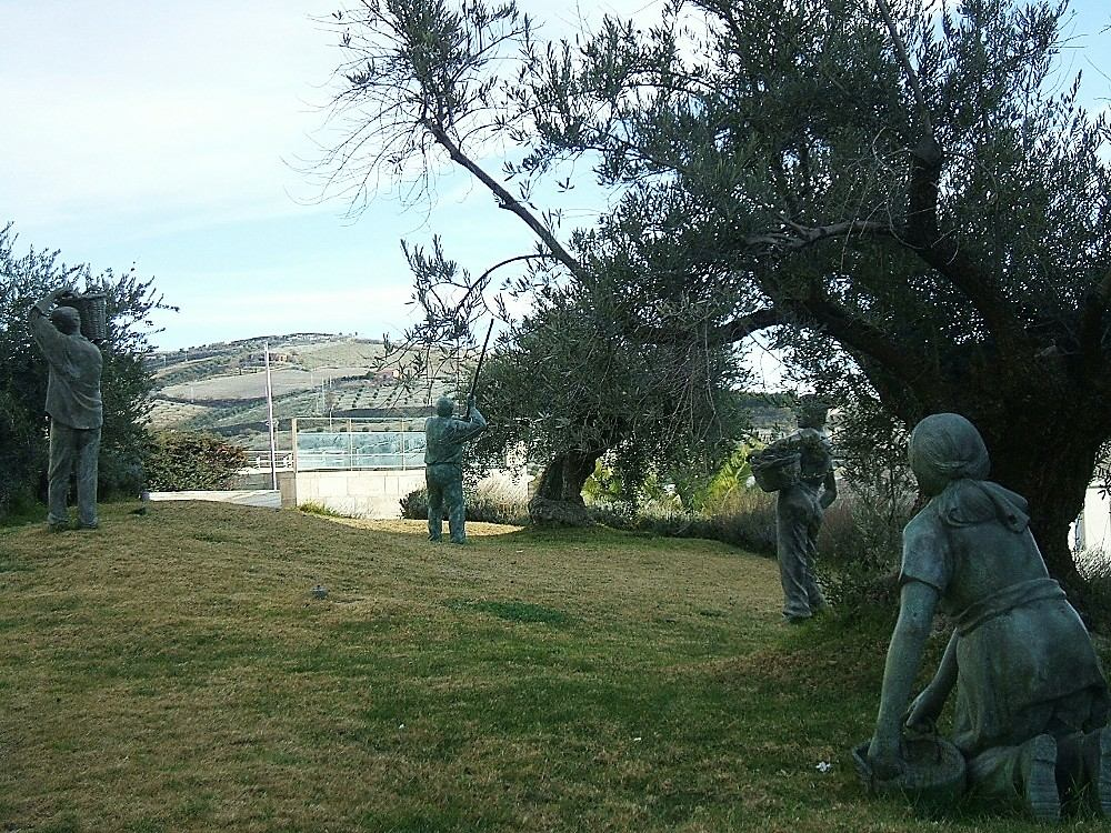 Monumento a los Olivareros y Olivareras, Baena, Córdoba (España)